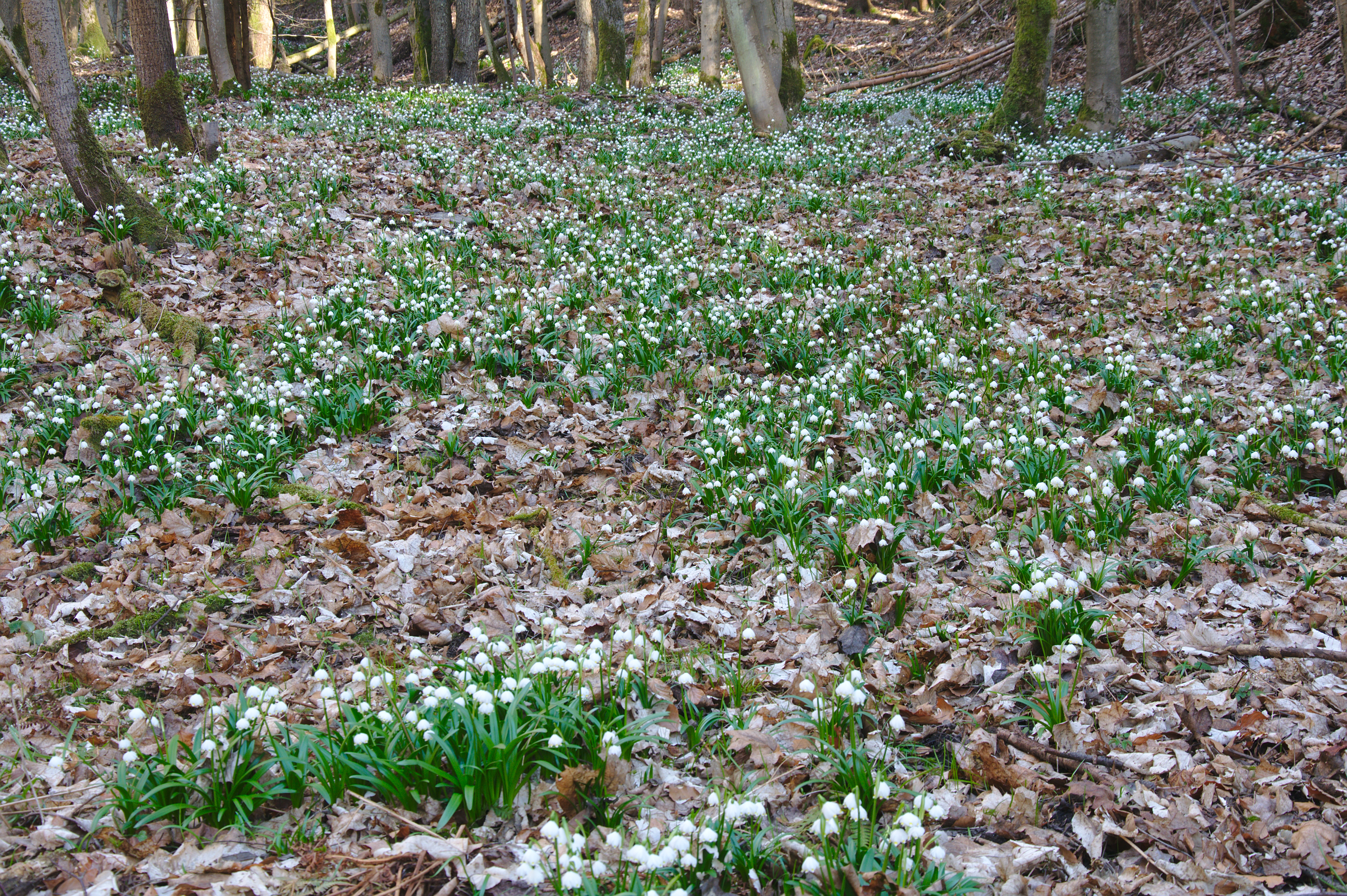 Přírodní památka Údolí Chlébského potoka, okres Blansko